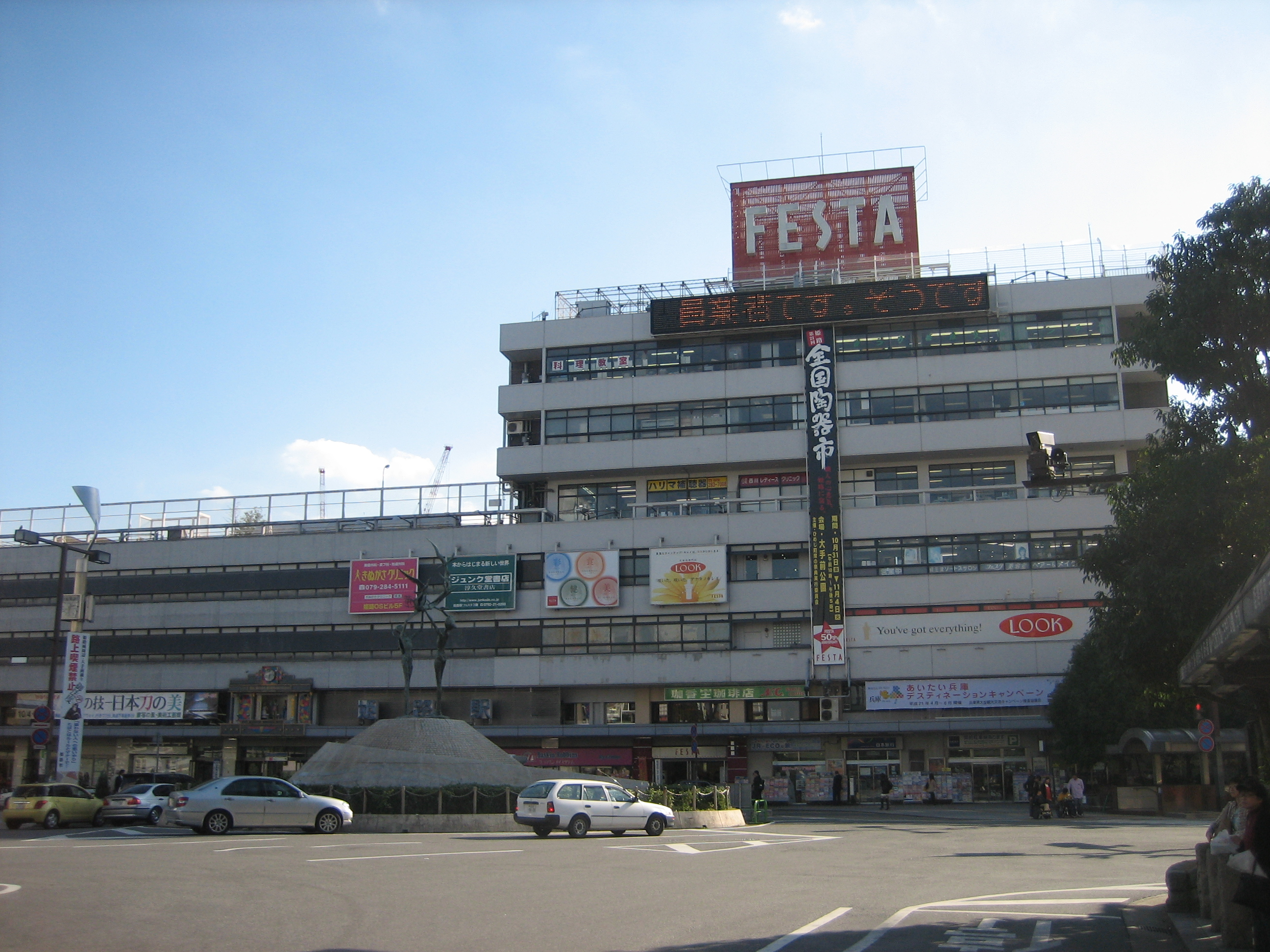 姫路駅ビル「FESTA」